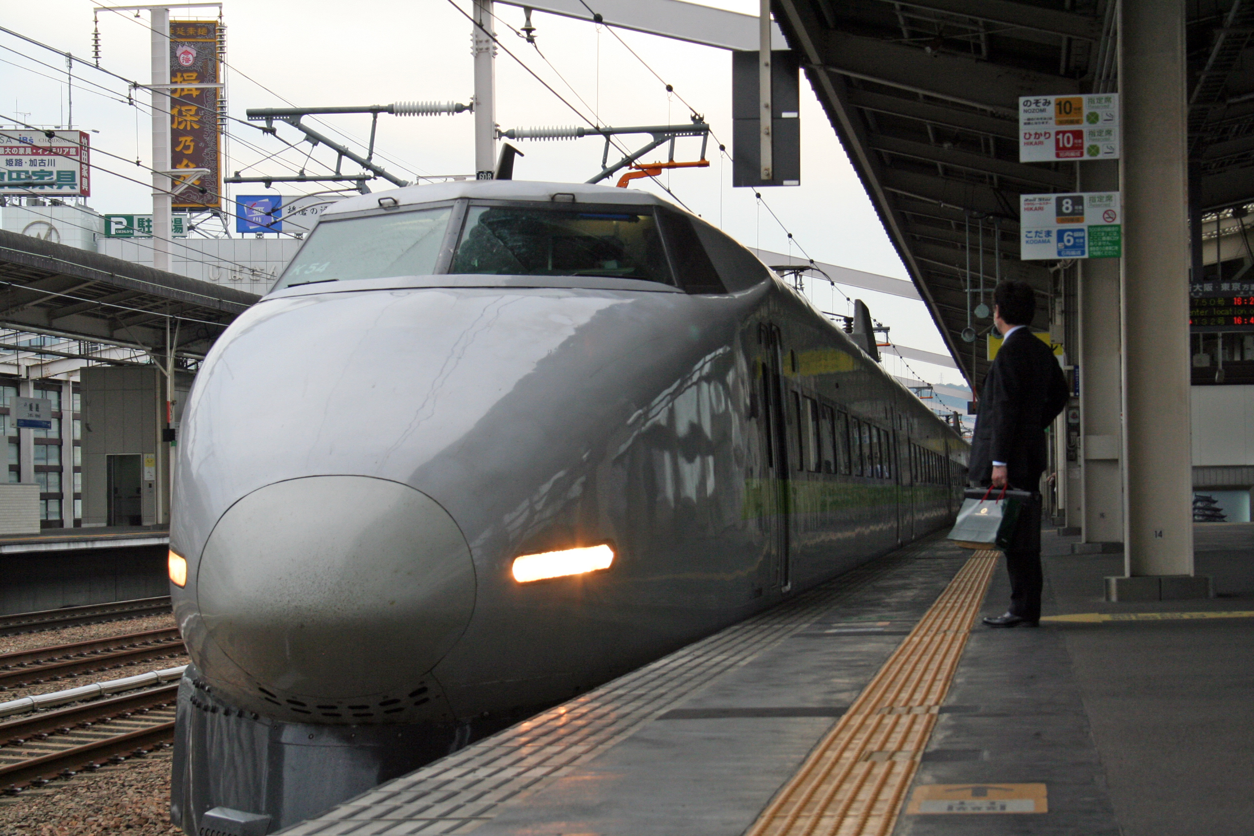 JR西日本の姫路駅。新幹線及びJRのホームなど。 11番ホームに停車した上りの新幹線。